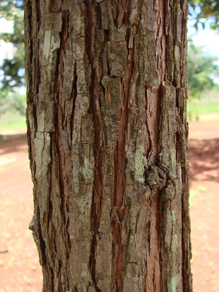 Cordia superba - BORAGINACEAE Jardim Botânico de Brasília - Distrito Federal - Brasil.